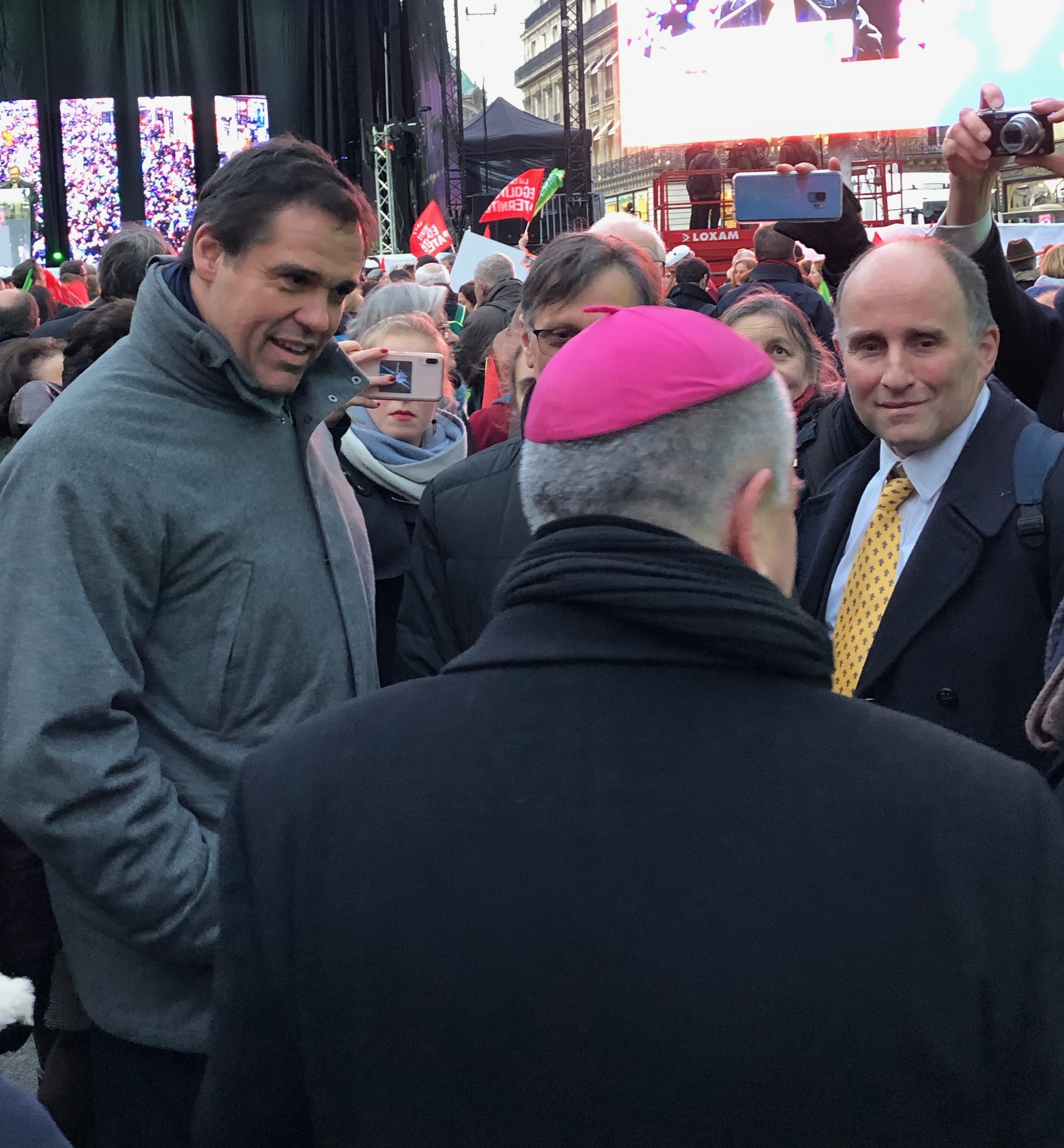 Louis de Bourbon et Mgr Aillet à la Marche pour la famille